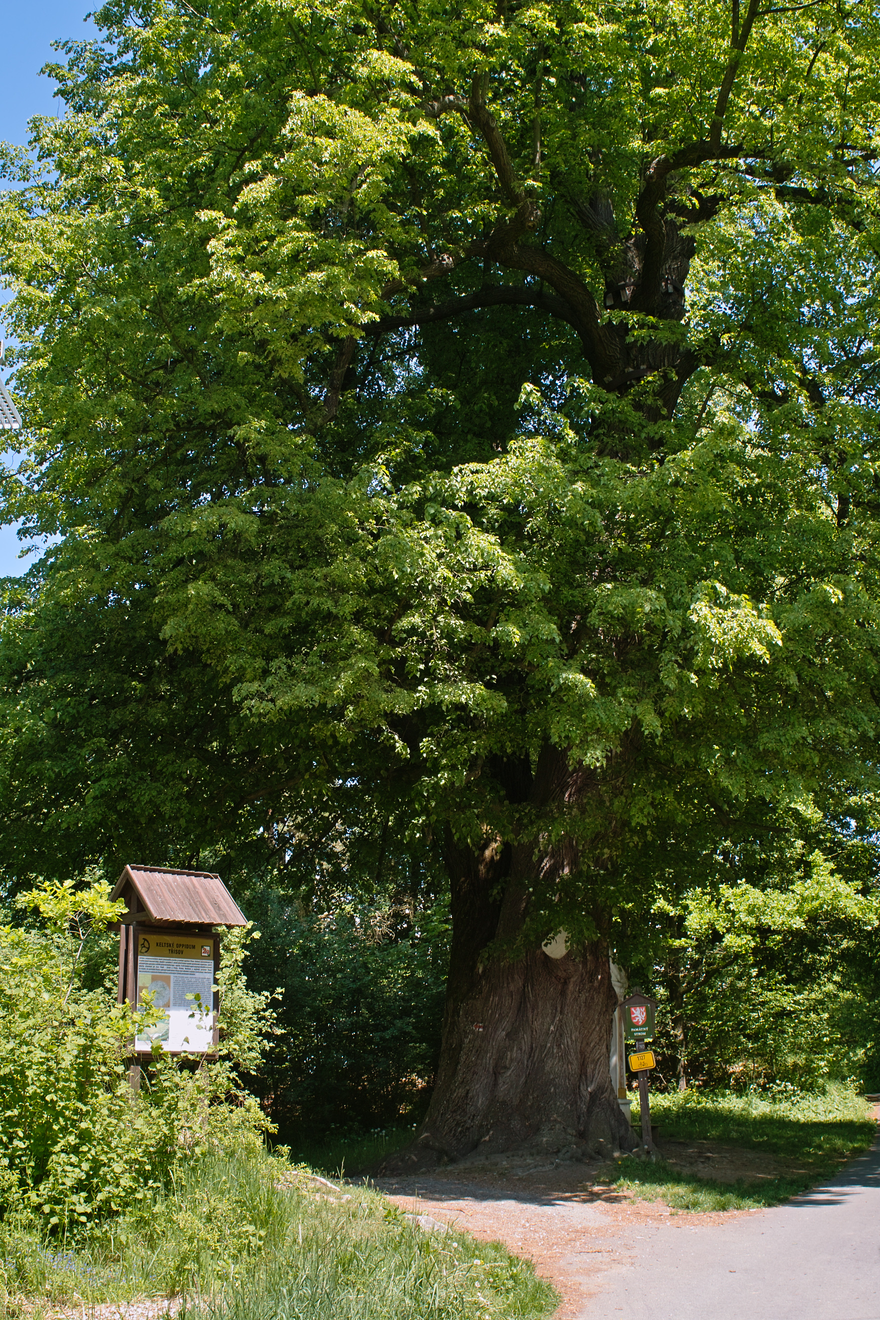 Třísovská lípa, památný strom